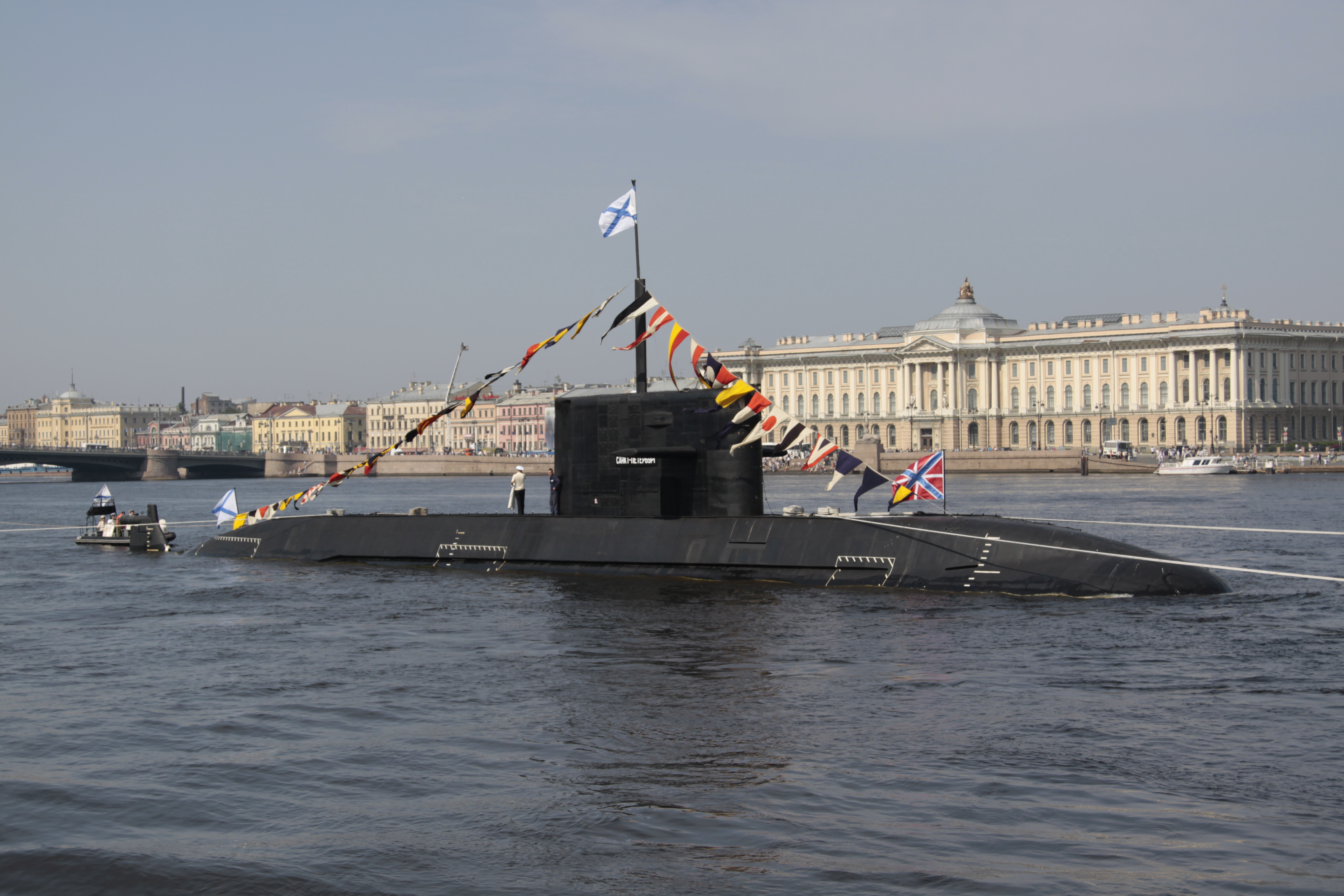 Подводная лодка «Санкт-Петербург» в Неве.